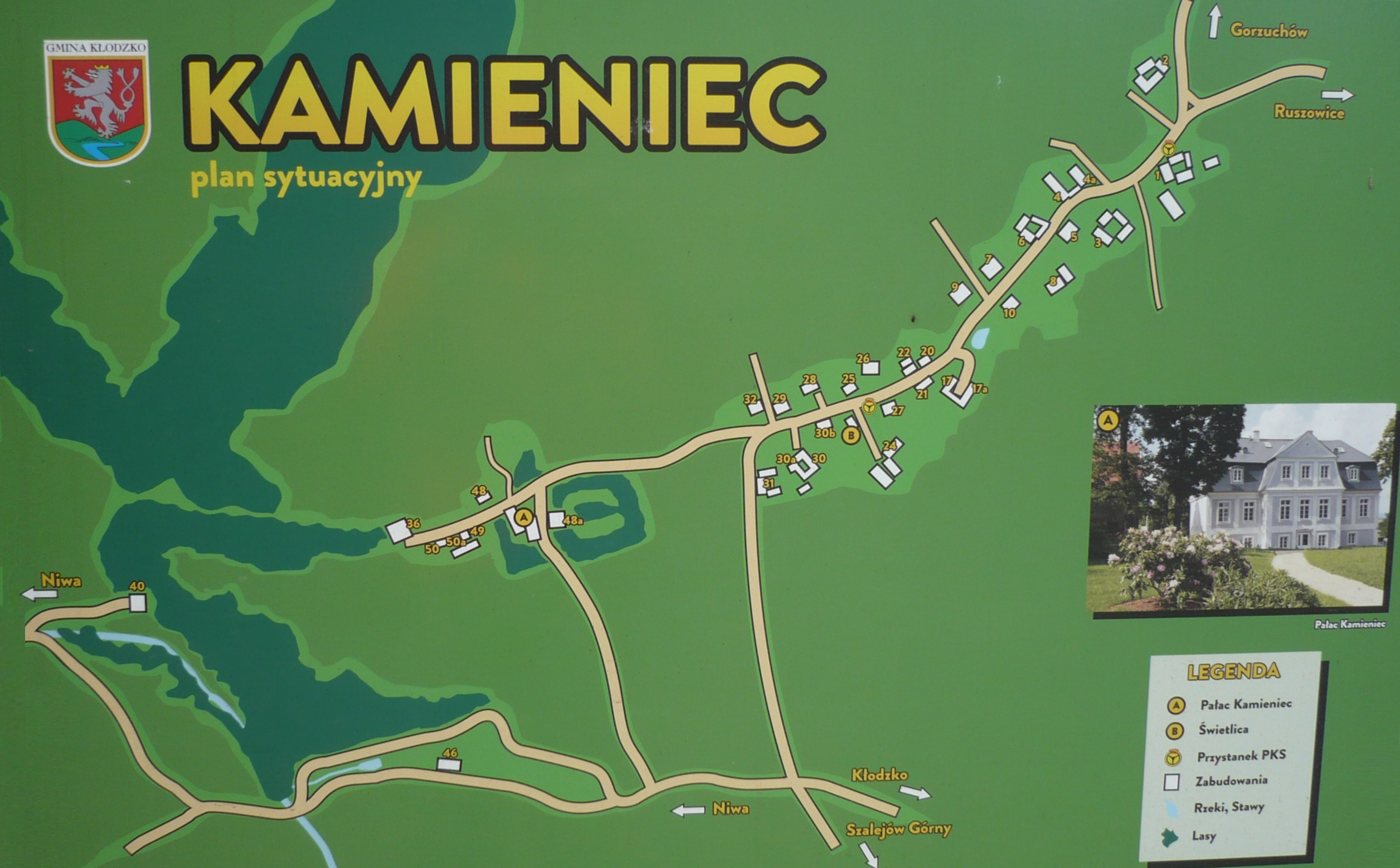 Kamieniec. Tablica